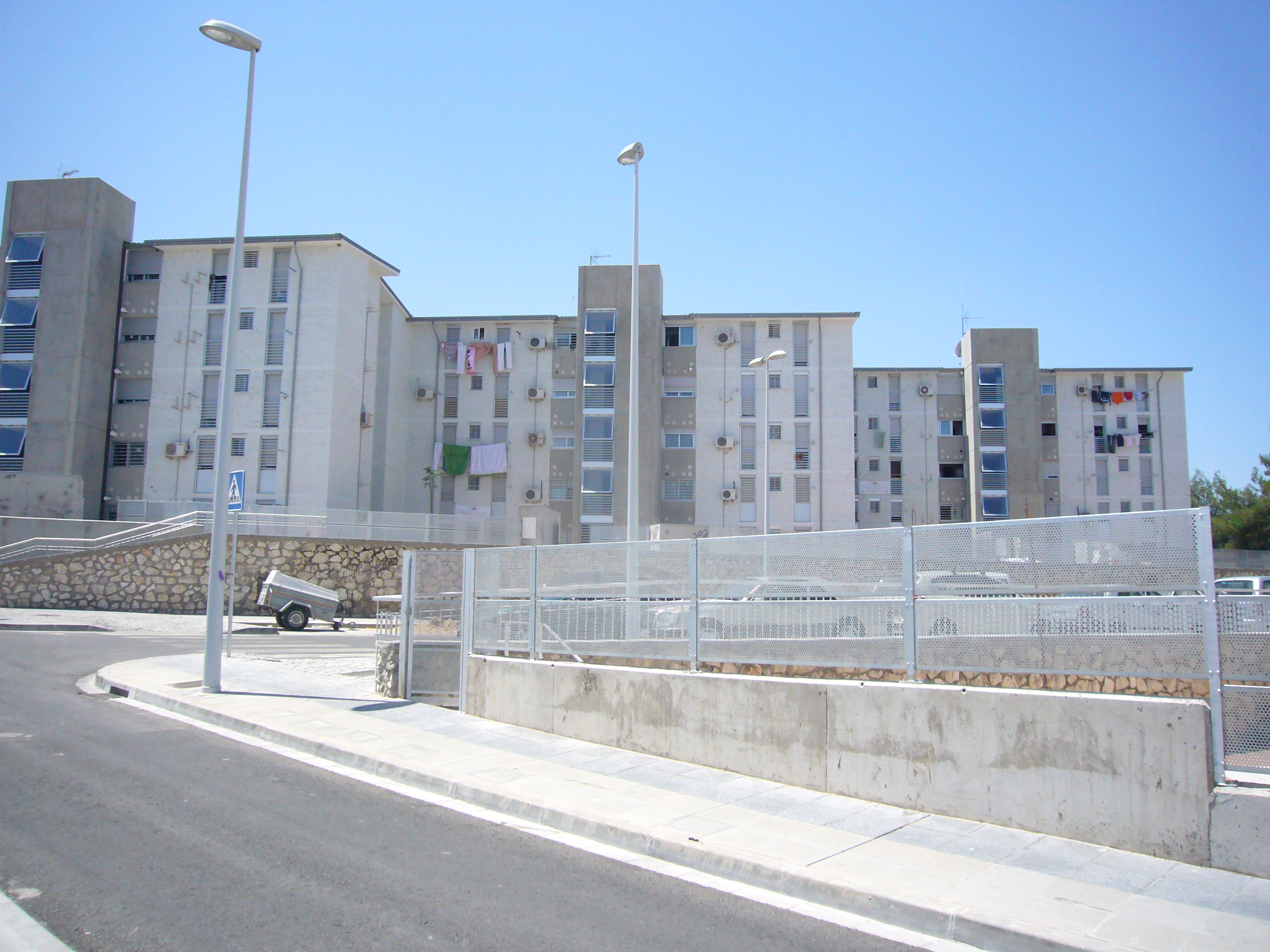 Proceso de rehabilitación del barrio San Martin de Porres (Cordoba)